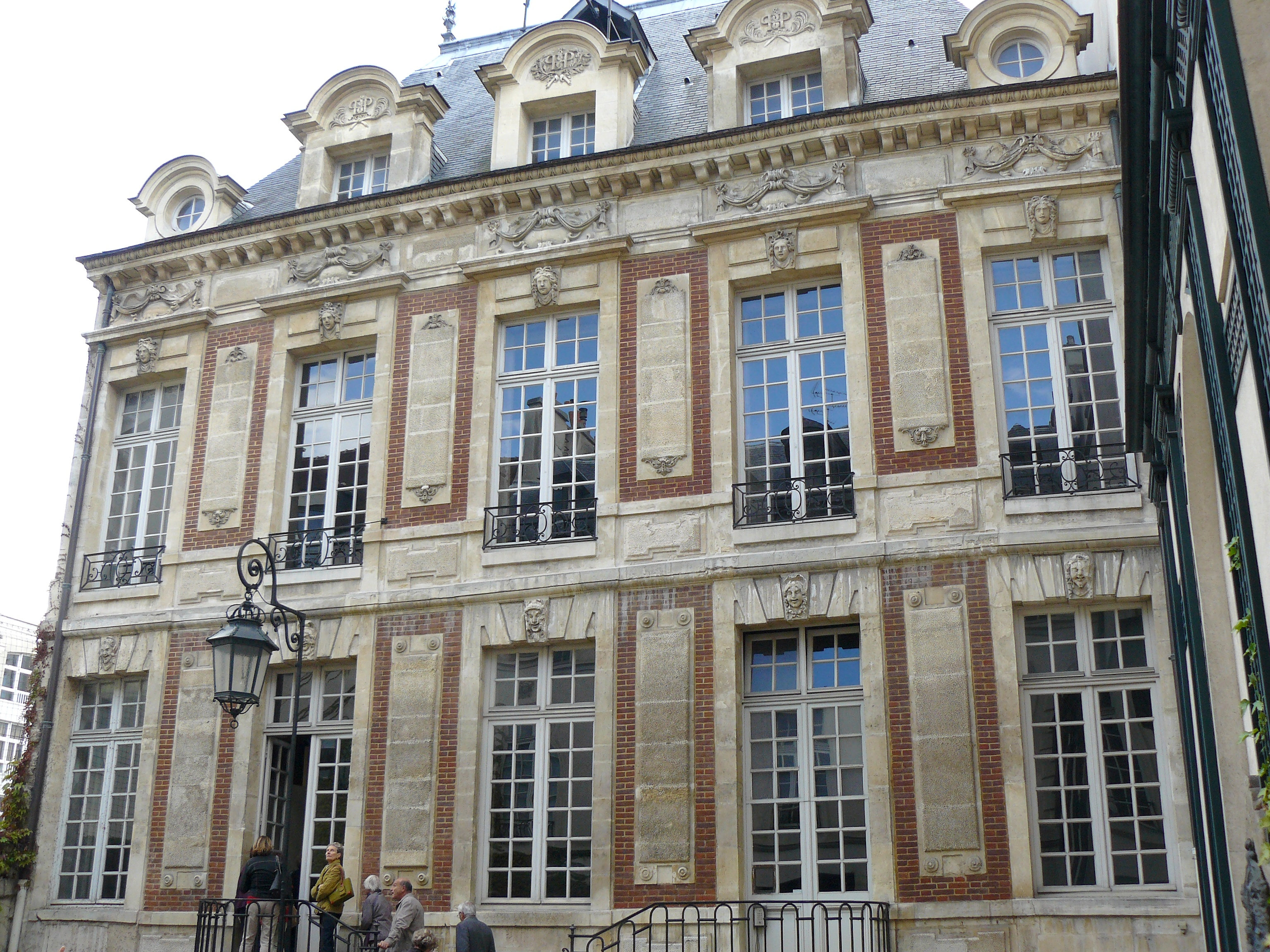 Façade sur cour de l'hôtel de Chalon-Luxembourg, au 26, rue Geoffroy-l'Asnier, Paris (4e arrond.).